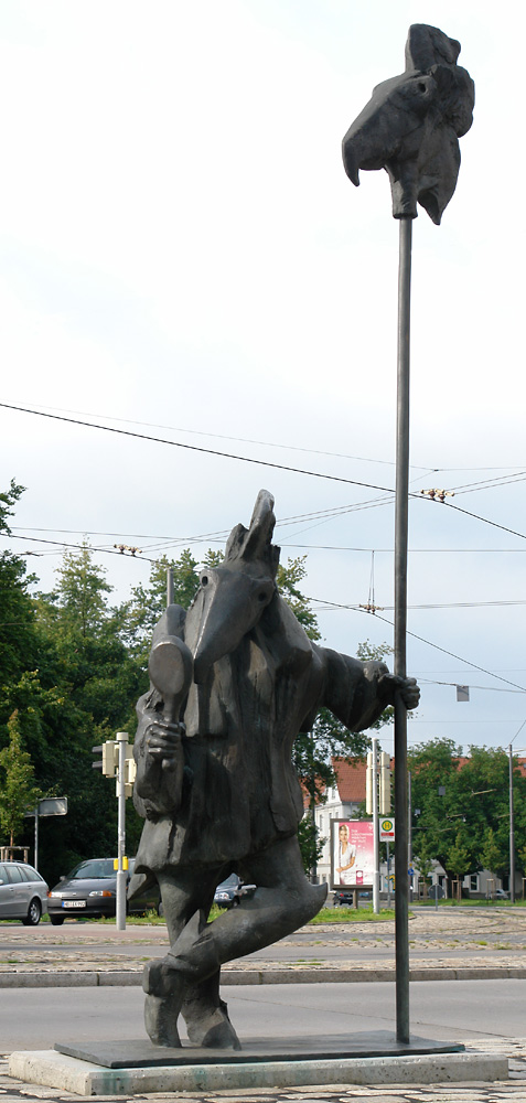 Bremen: Bronzeguss „Der Gaukler“ am Leibnizplatz. Entwurf und Ausführung: Christoph Fischer (1991) k: kunst im öffentlichen raum bremen